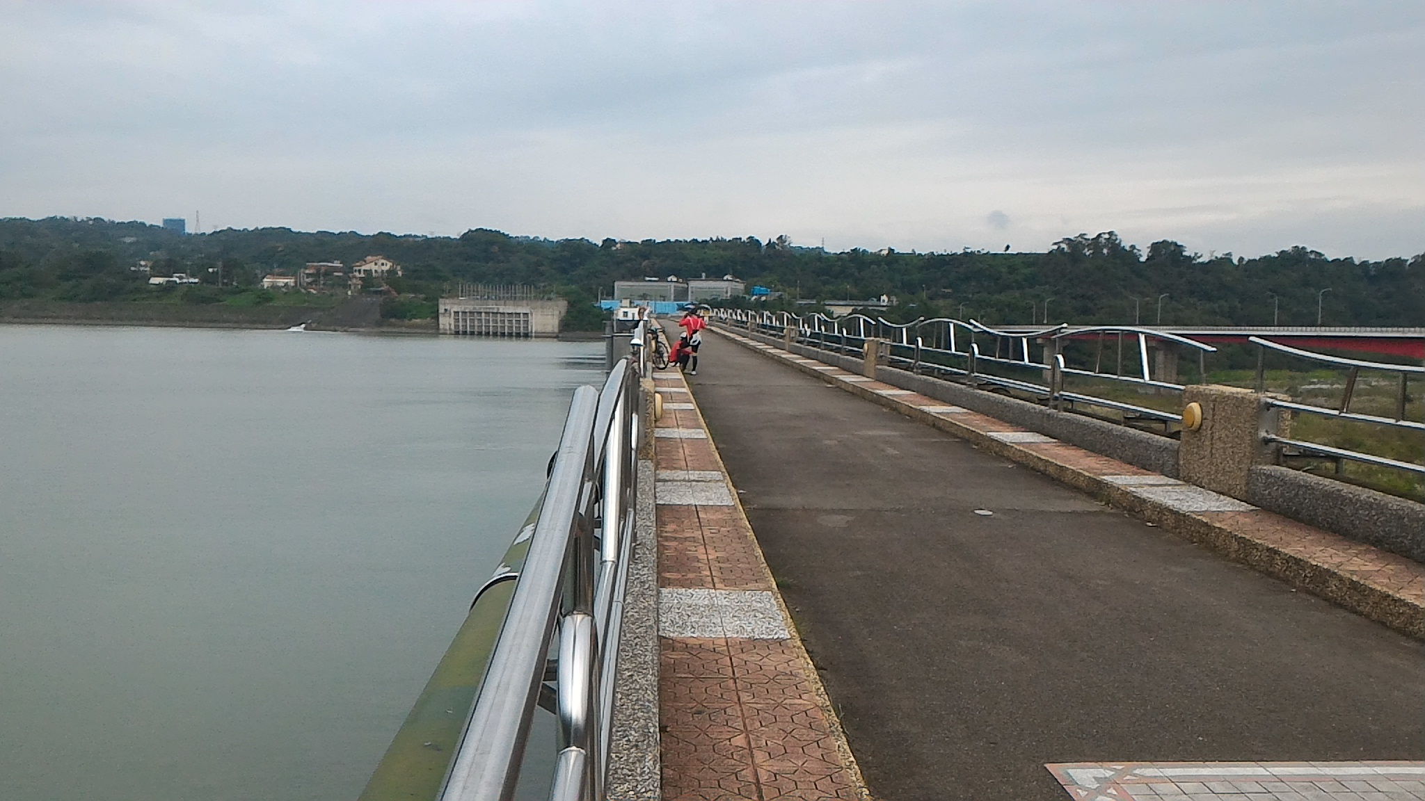 Bân-lâm-gú: 臺灣桃園石門水庫後池大橋。